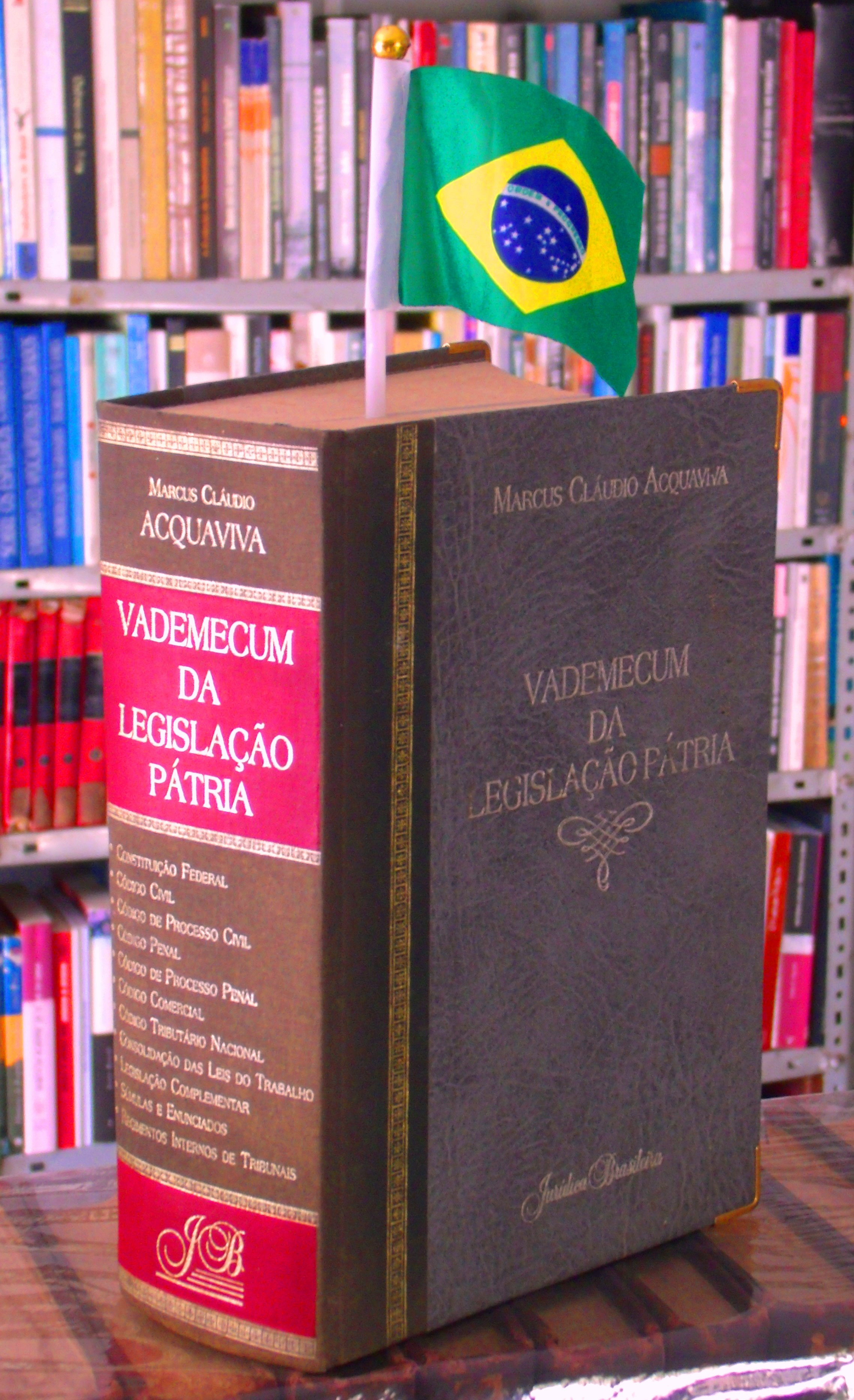 Um Vade mecum sobre legislação do Brasil.